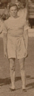 El Grafico del 14 de Enero de 1922. Edicion 133